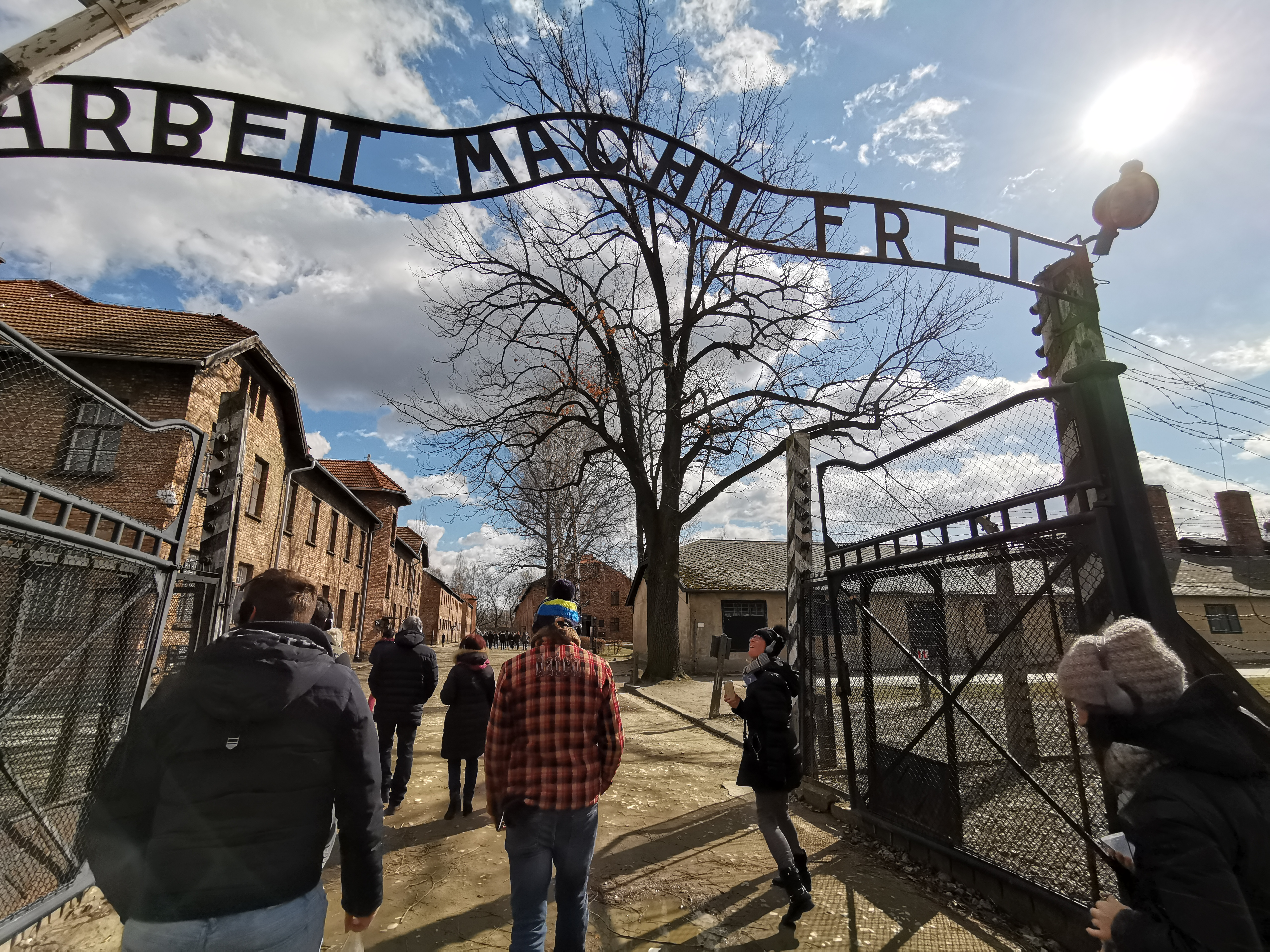 Auschwitz